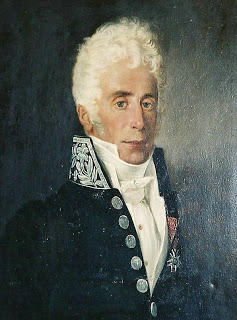 Portrait de Jacques Mercier (1776-1858), homme politique français du XIXe siècles, d'après Extrait du Dictionnaire des rues et monuments d'Alençon (Alain Champion, Éditions Cénomane, 2003).